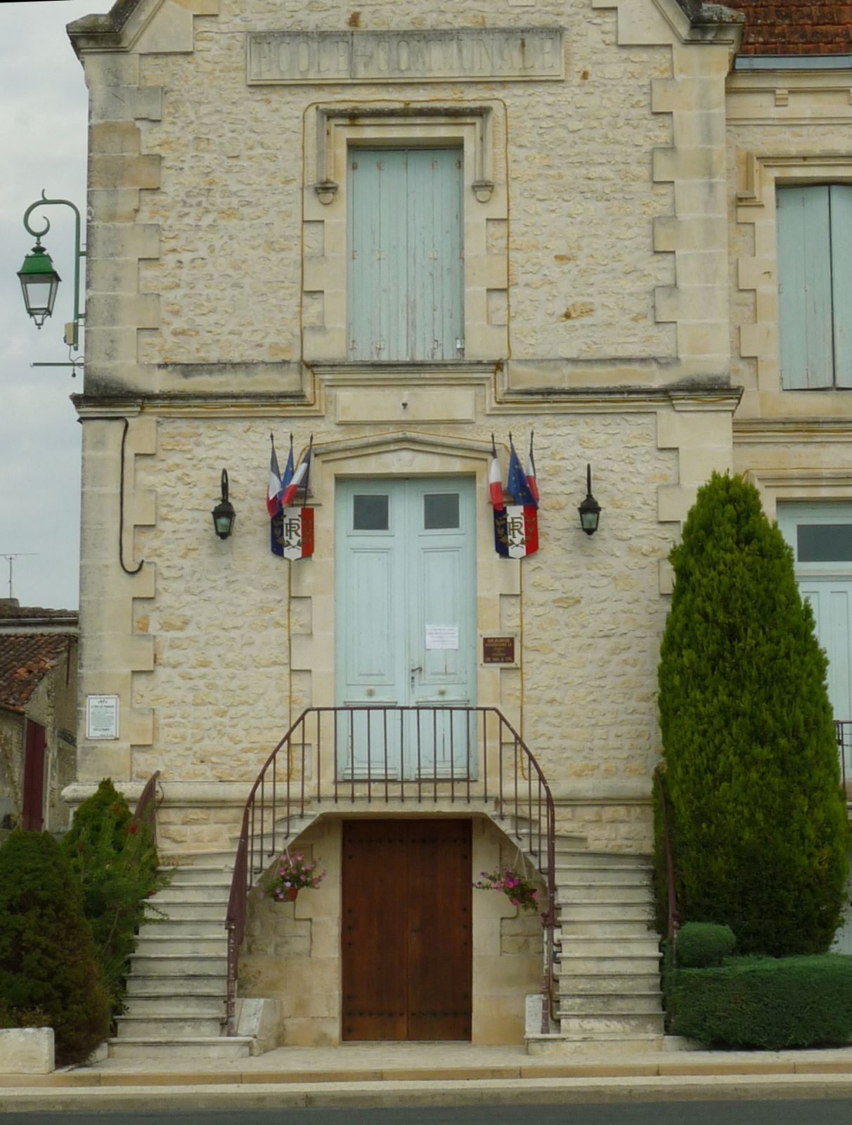 mairie de Virollet (17), France